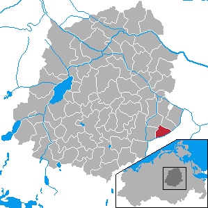 Grischow, Landkreis Demmin, Mecklenburg-Vorpommern